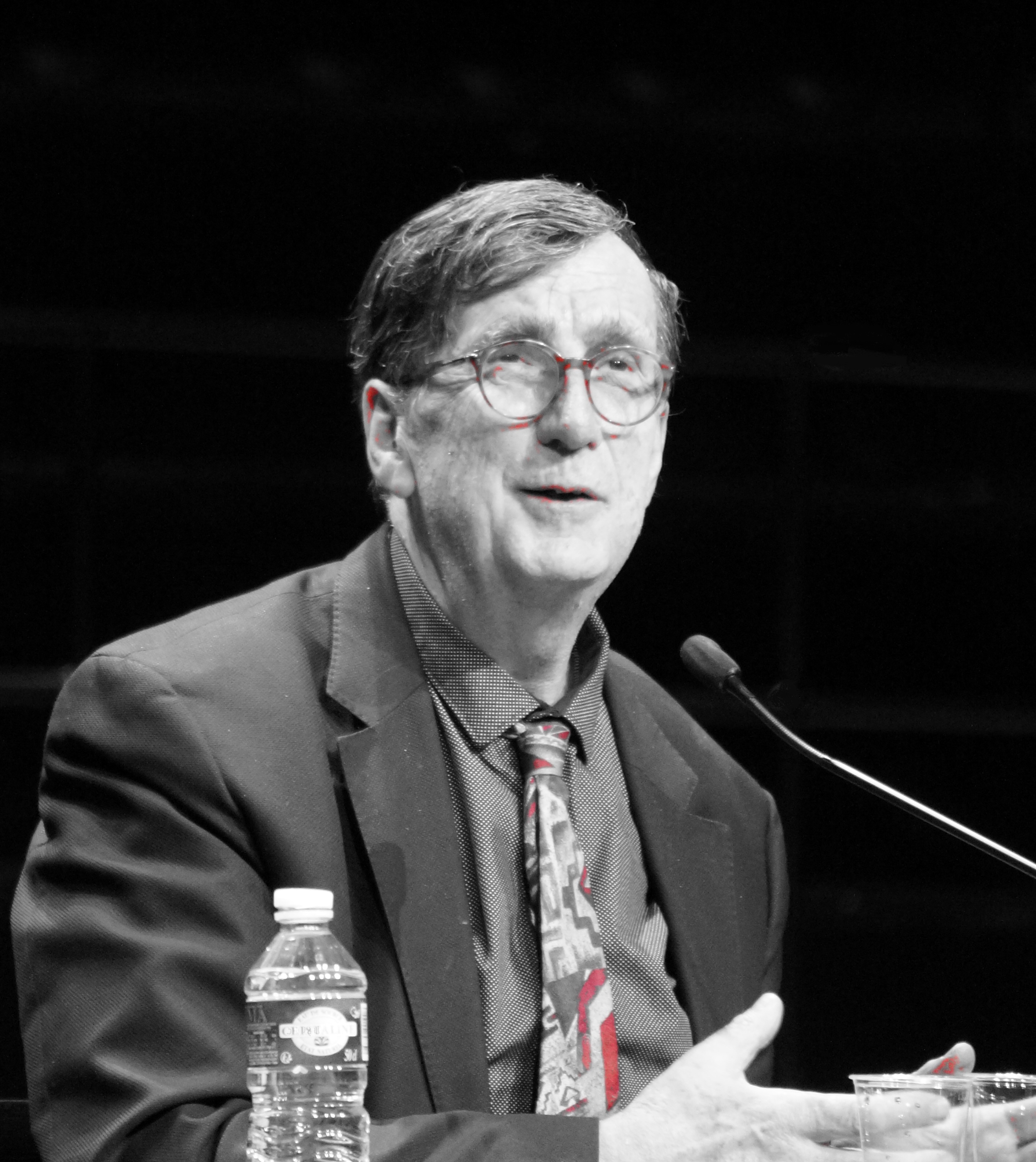 Bruno Latour, französischer Soziologe und Philosoph, bei einer Konferenz zum Anthropozän.